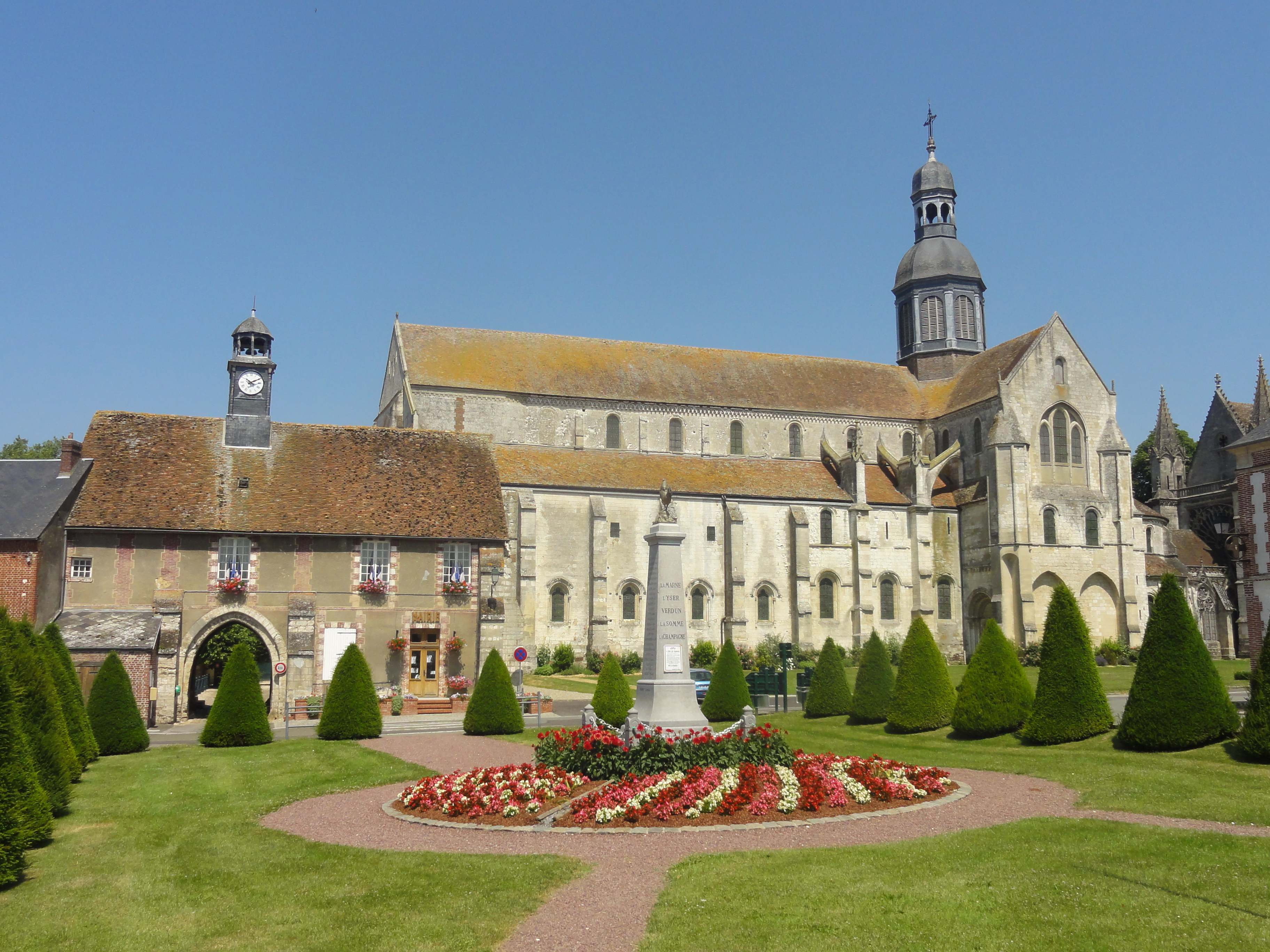 Église abbatiale Saint-Germer de l'ancienne abbaye Saint-Germer-de-Fly - voir le titre du fichier.